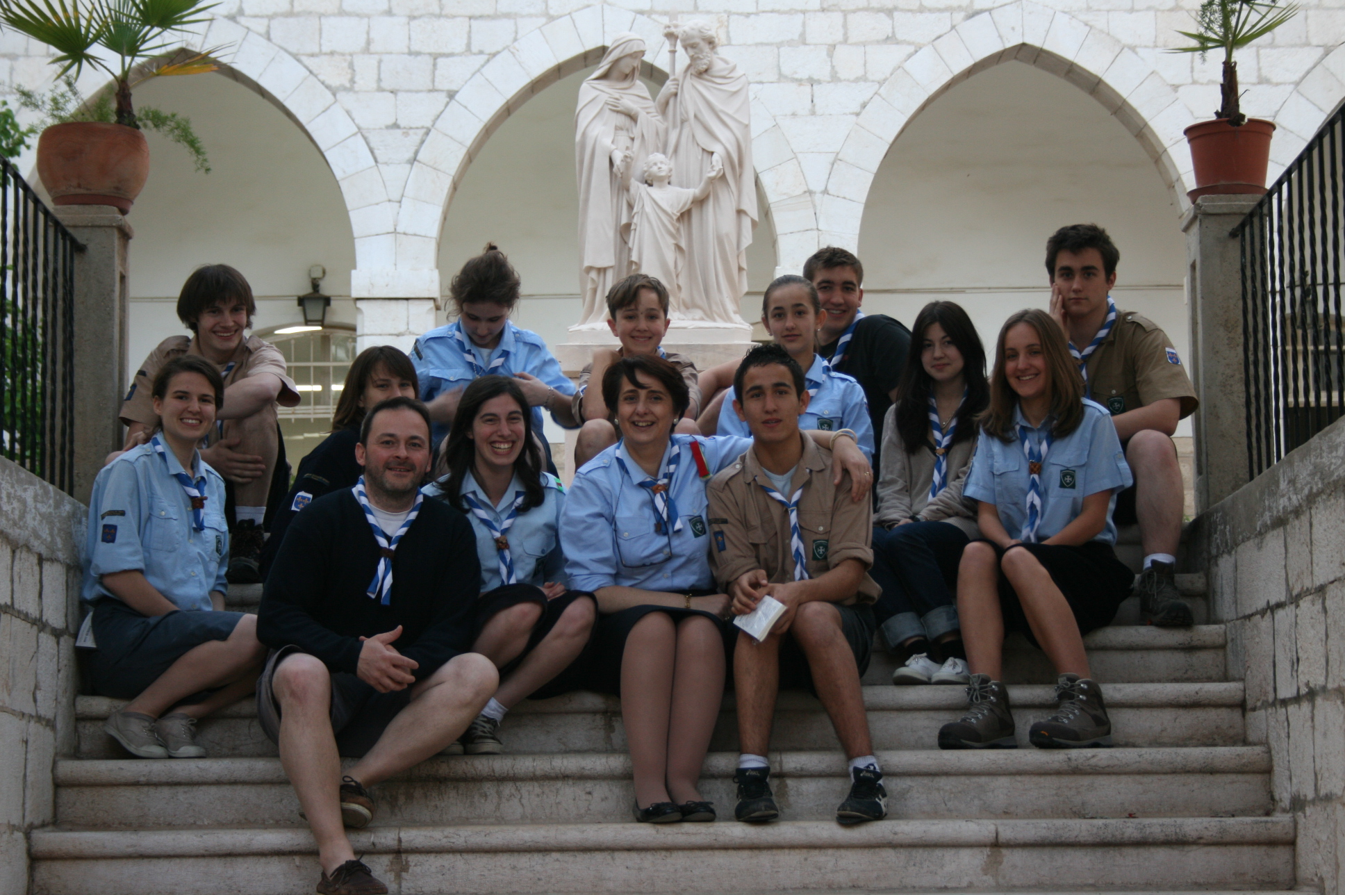 Chefs, Voyage humanitaire des Scouts et Guides Saint Benoît - Nazareth, Israël 2009